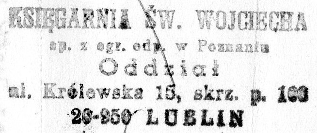 Stempel Księgarni Św. Wojciecha - 1982r.